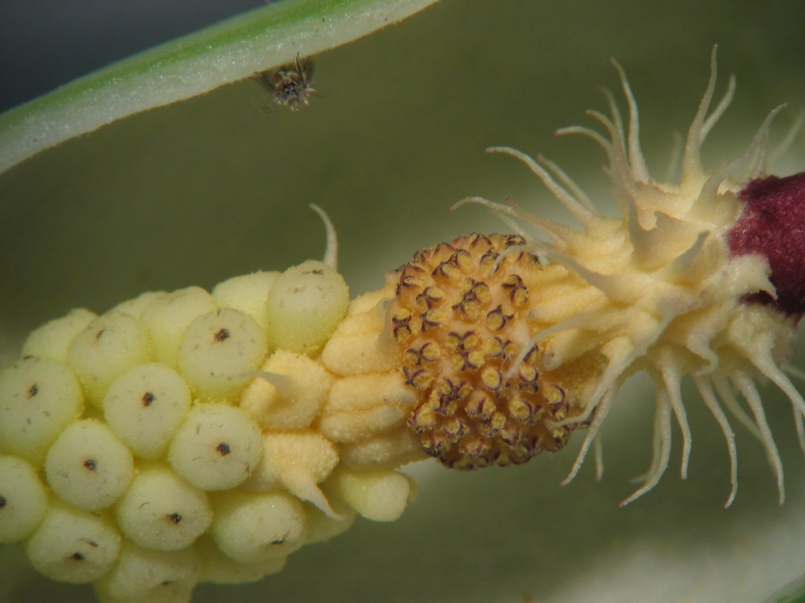 Detailaufnahme der Blüte des Gefleckten Aronstabes Arum maculatum